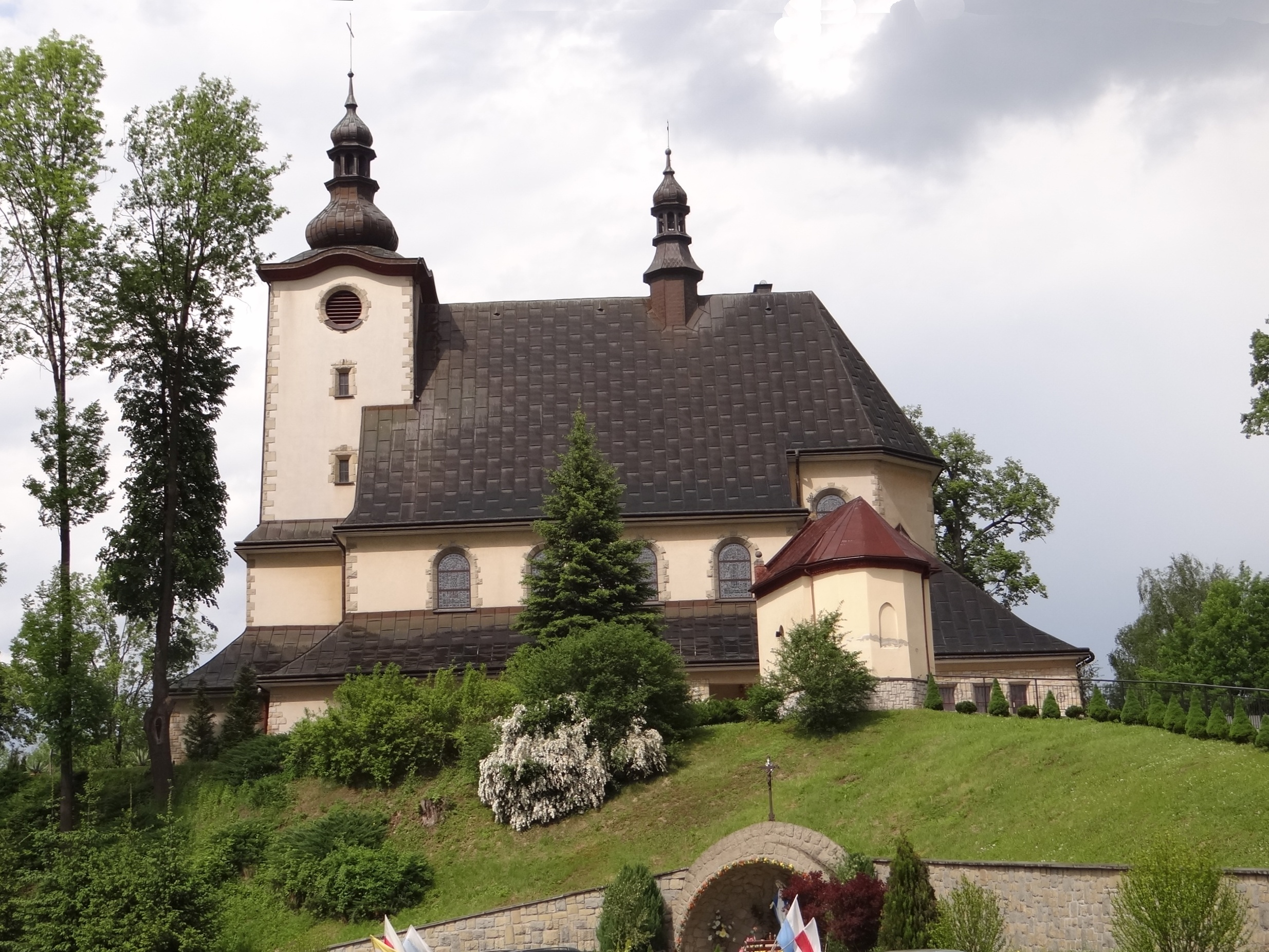 Korzenna 7 - rzymskokatolicki kościół parafialny pw. MB Szkaplerznej, 1957-1960